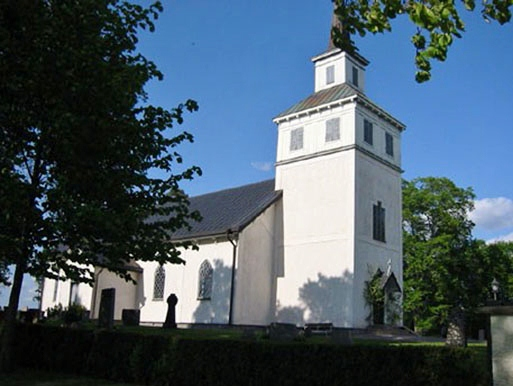 Blåviks kyrka